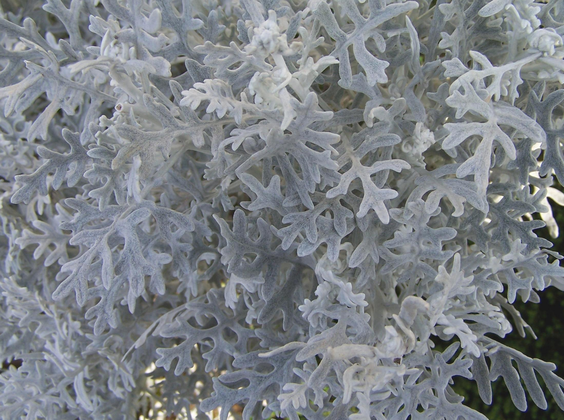 Senecio cineraria (cultivare)